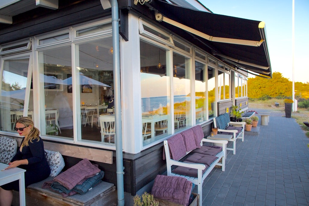 Restaurant Kadeau Bornholm i 2014.